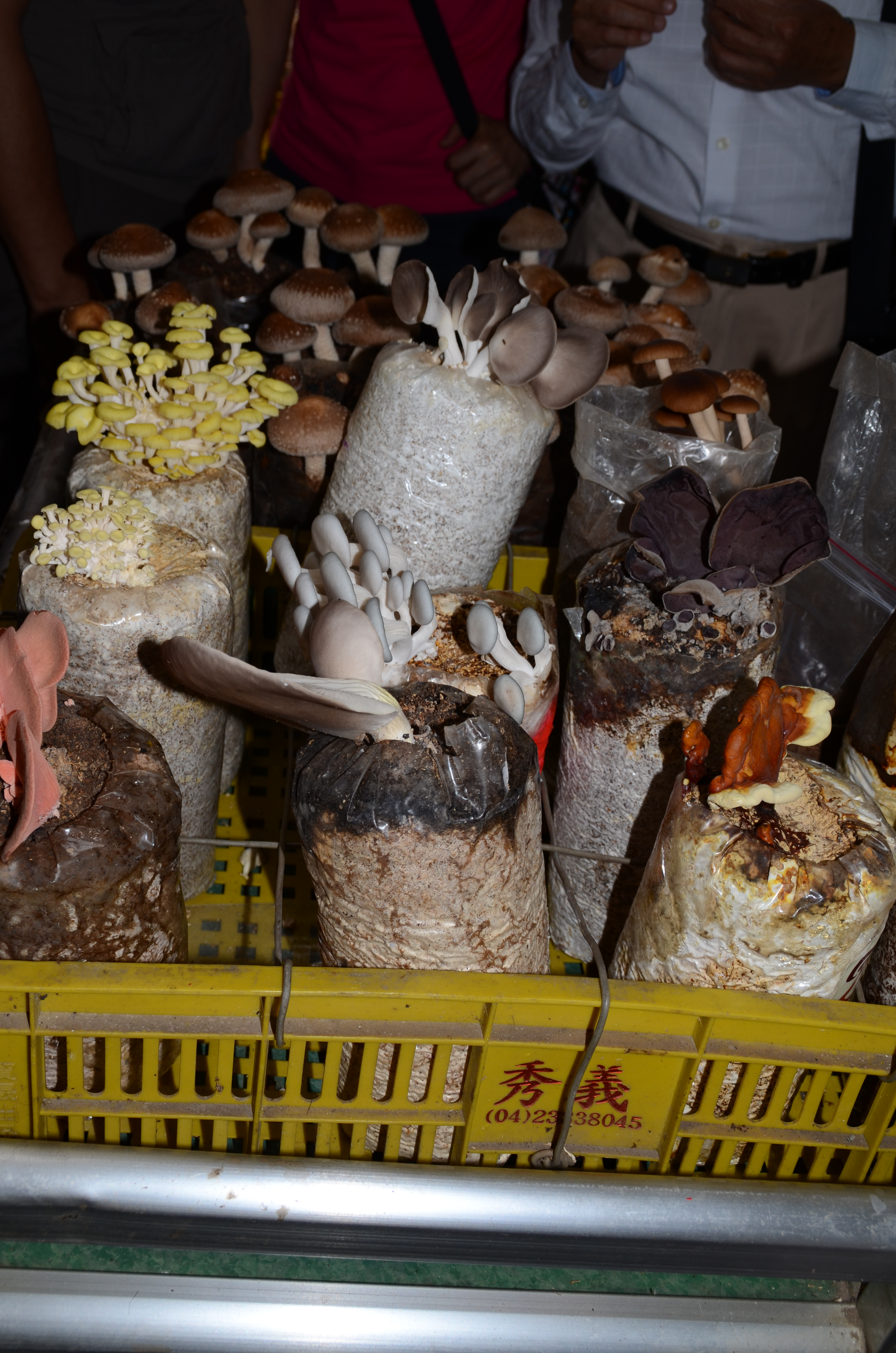 中文（台灣）: 台中新社採菇2